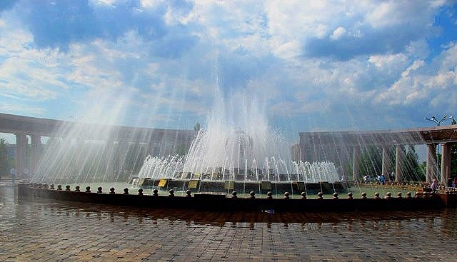 Один из фонтанов на Каскадной площади в г.Караганда